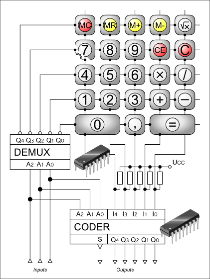 Princip ovládání maticové tlačítkové sady